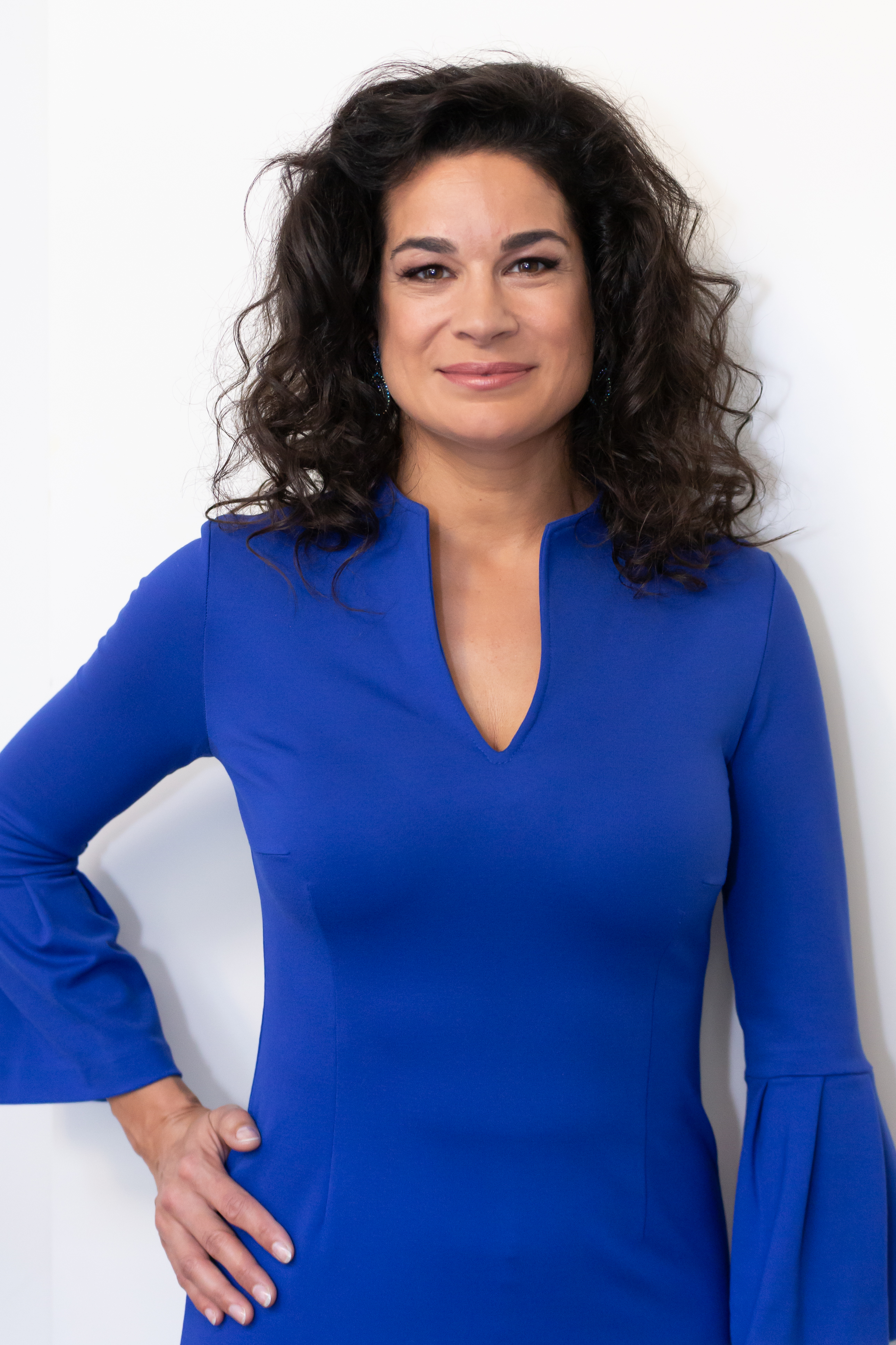 TV, ARD, Cast "Rote Rosen" Staffel 16; Caroline Kiesewetter